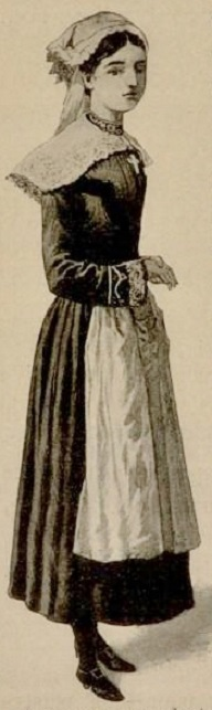 Jeune fille en costume breton de l'Île-Tudy vers 1900 (Paul D'Ivoi, " Voyages excentriques. Le docteur Mystère", 1900), décrit ainsi : "Petit bonnet de dentelles, fichu rose tombant sur la jupe blanche brodée de fleurettes bleues".